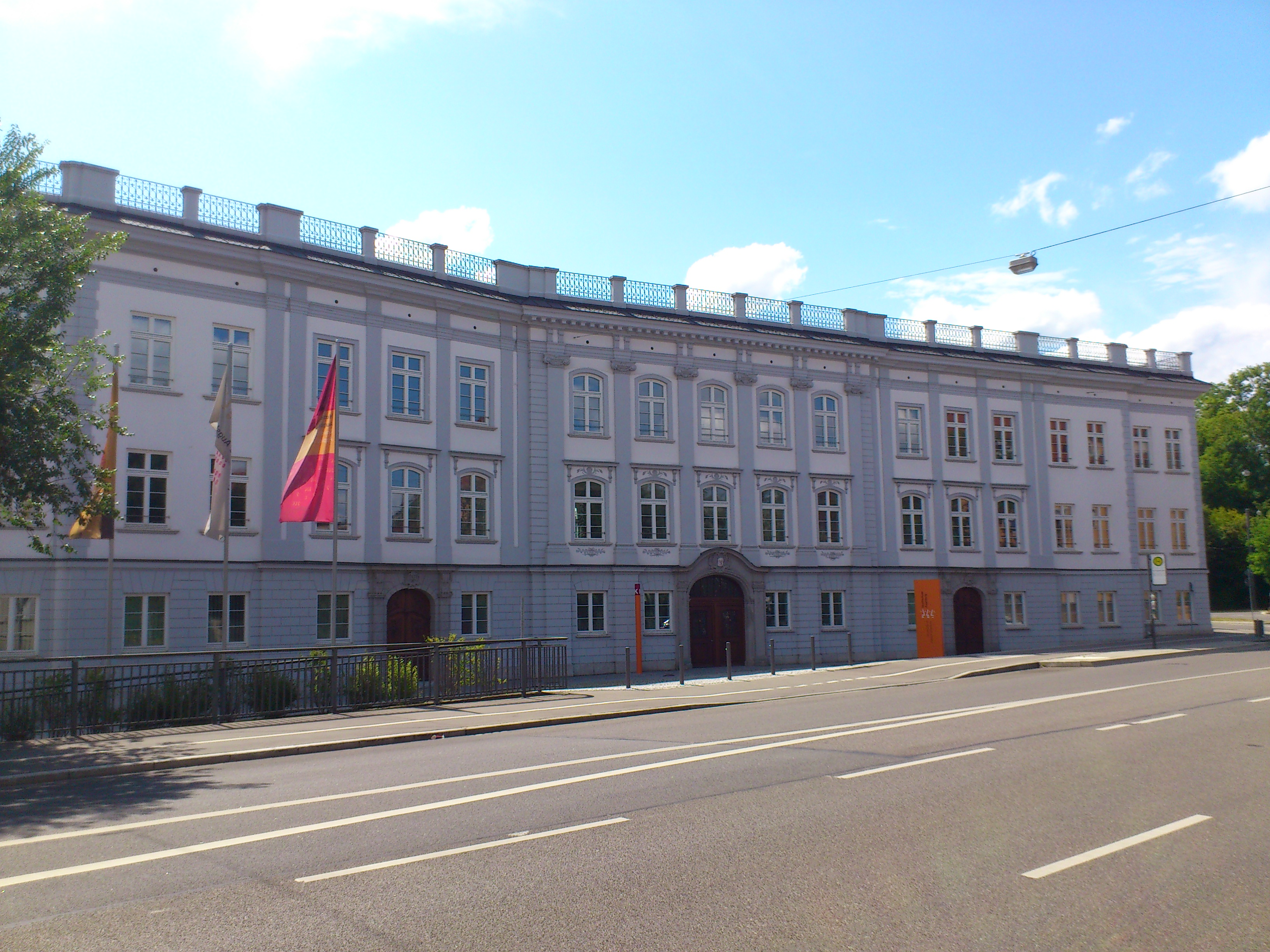 Hochschue Augsburg, Campus am Roten Tor, Gebäude K